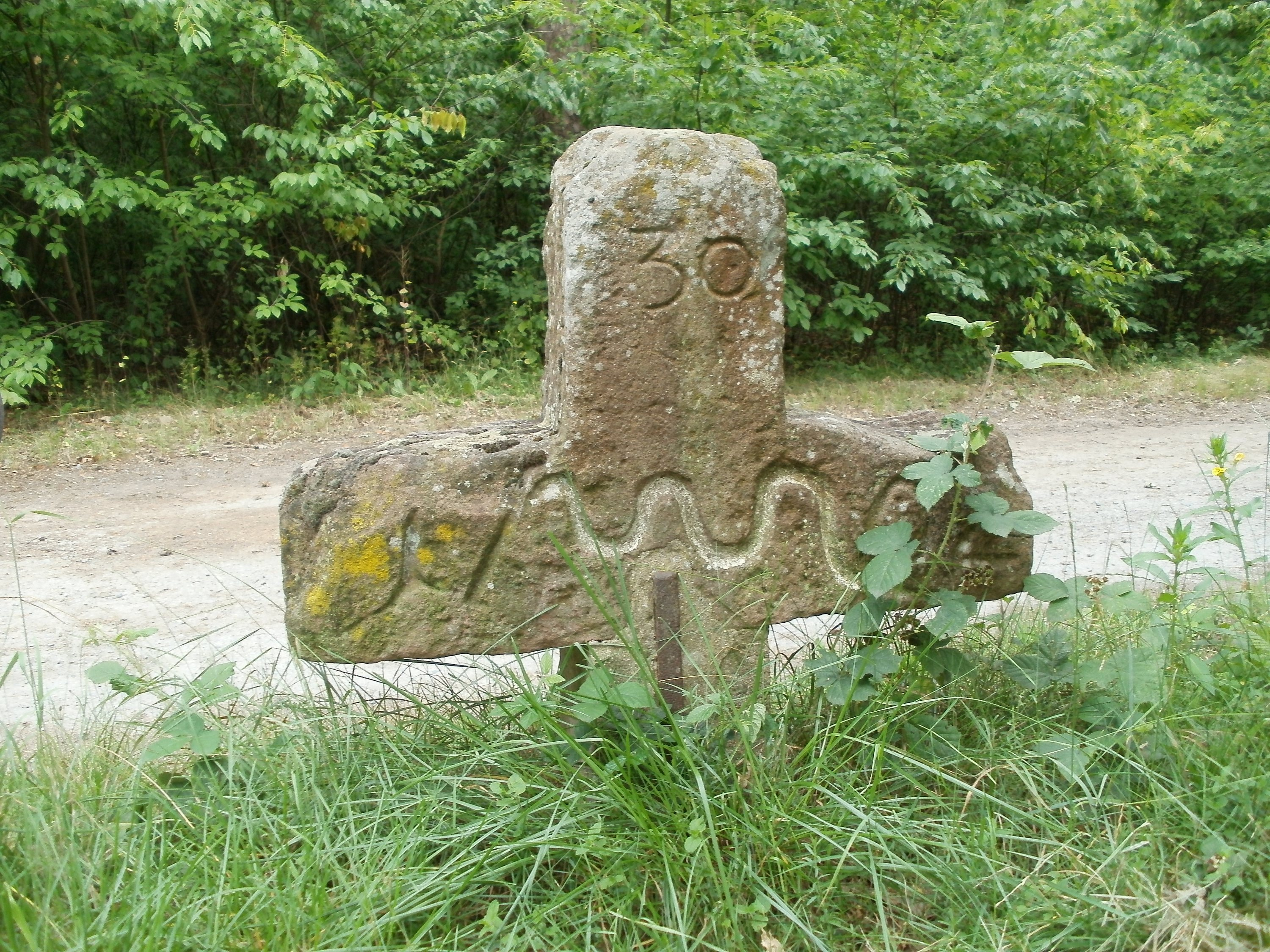 Herzogkreuz im Schwetzinger Hart bei Oftersheim